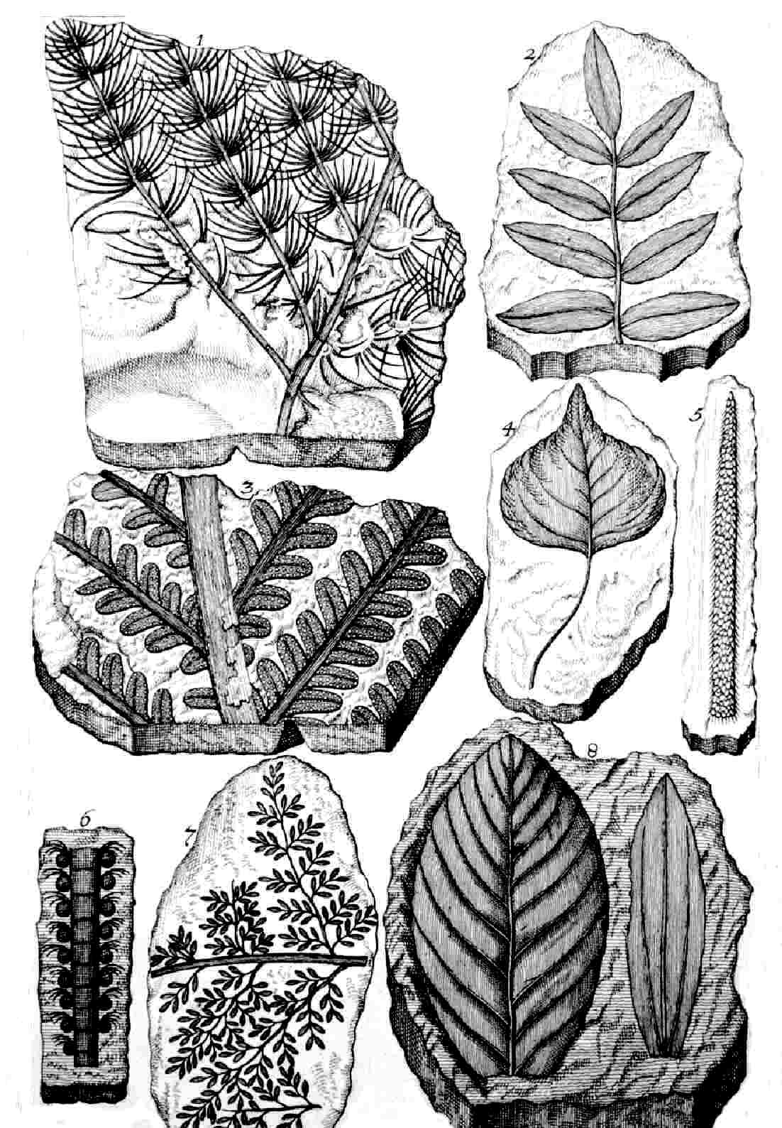 botanische Zeichnungen (aus seinem Herbarium deluvianum)